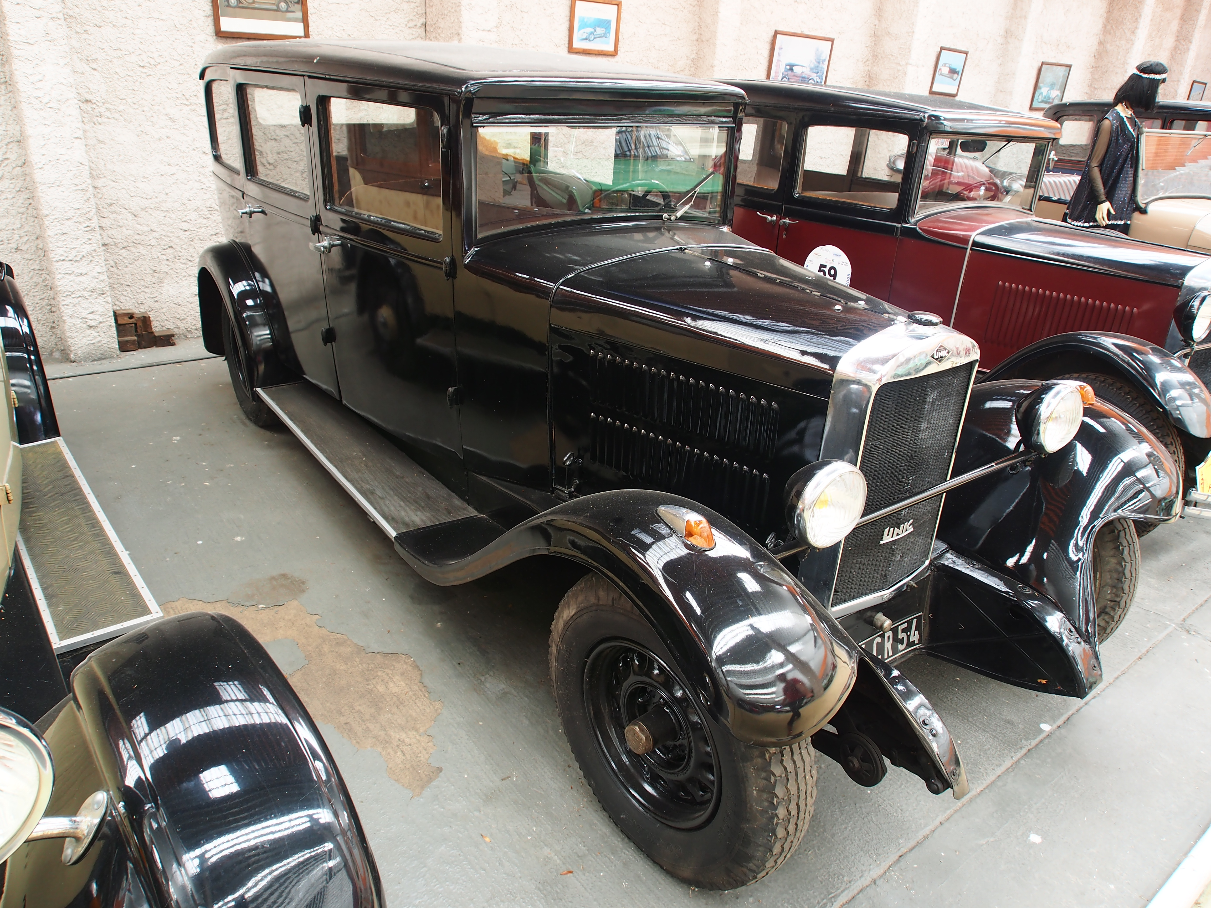 Photographed at the Association Lorraine des Amateurs d'Automobiles de collection et de loisirs.